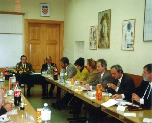 Osnivačka skupština Zajednice veleučilišta i visokih škola Hrvatske.